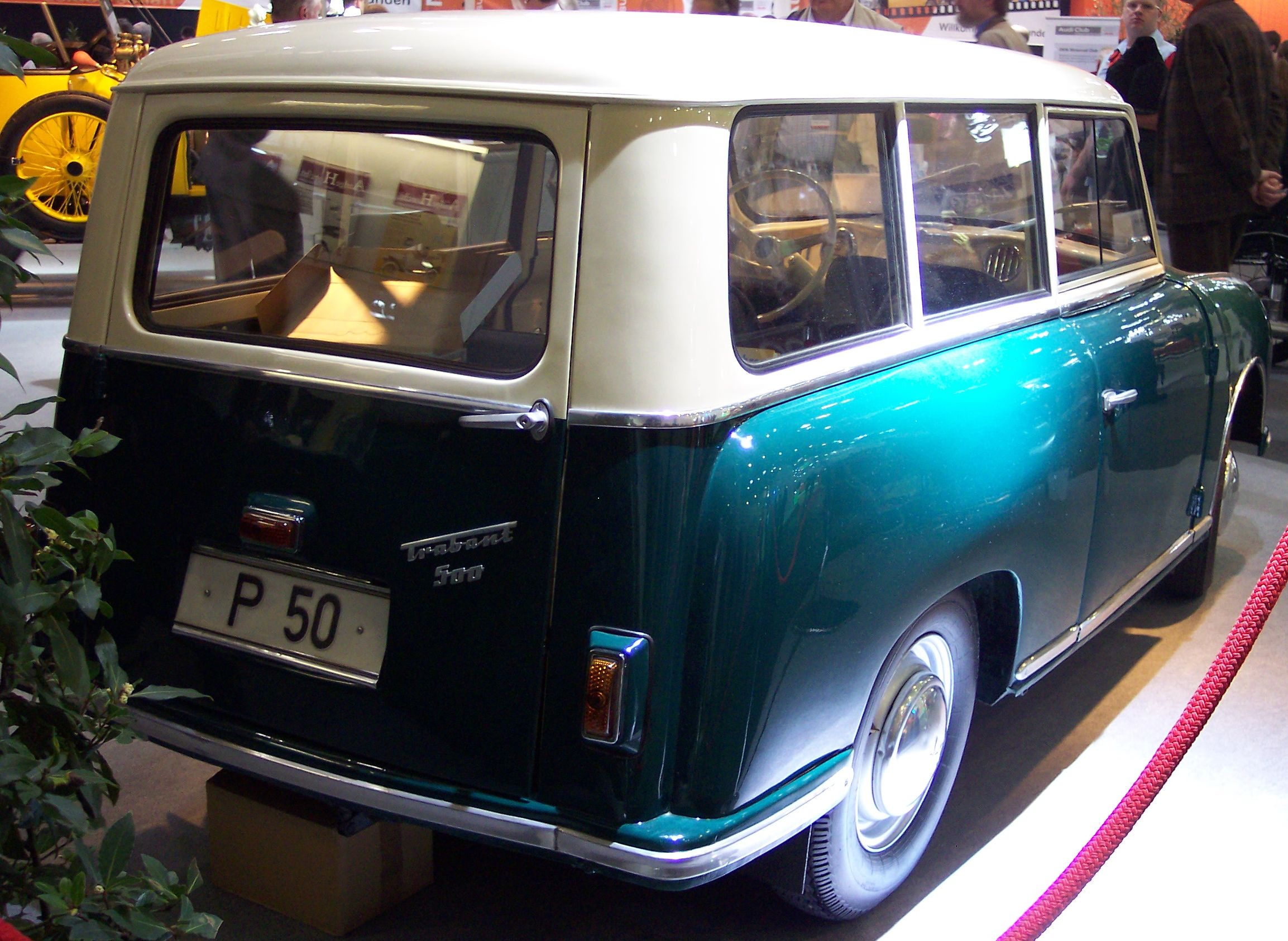 Trabant P50 Kombi